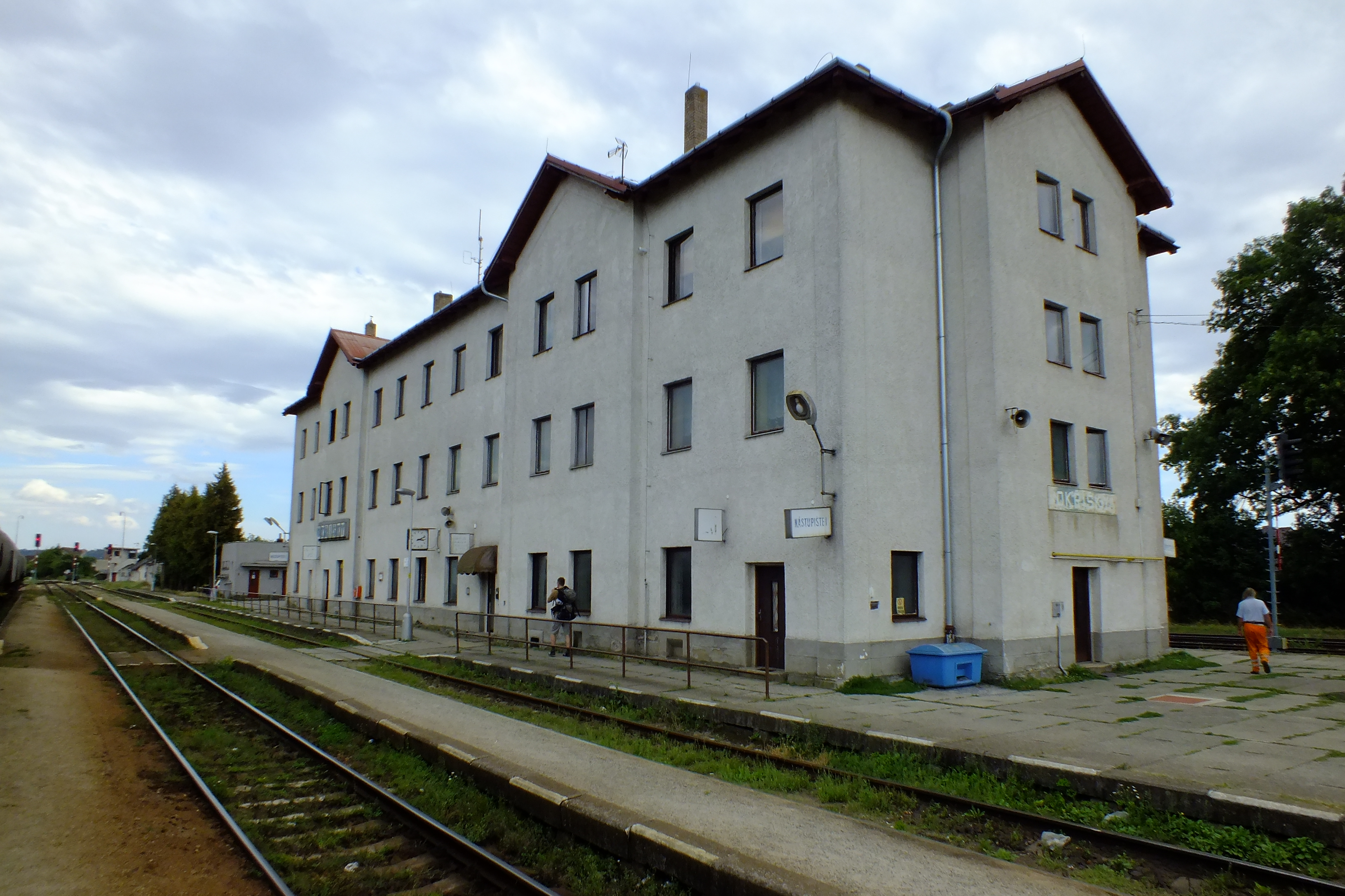 Staniční budova